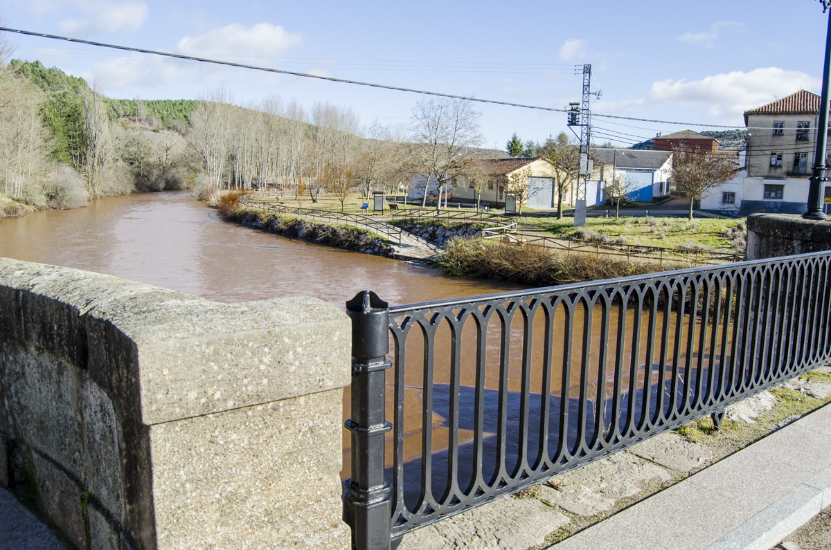 Alar del Rey. Río Pisuerga con crecida por fuertes lluvias.